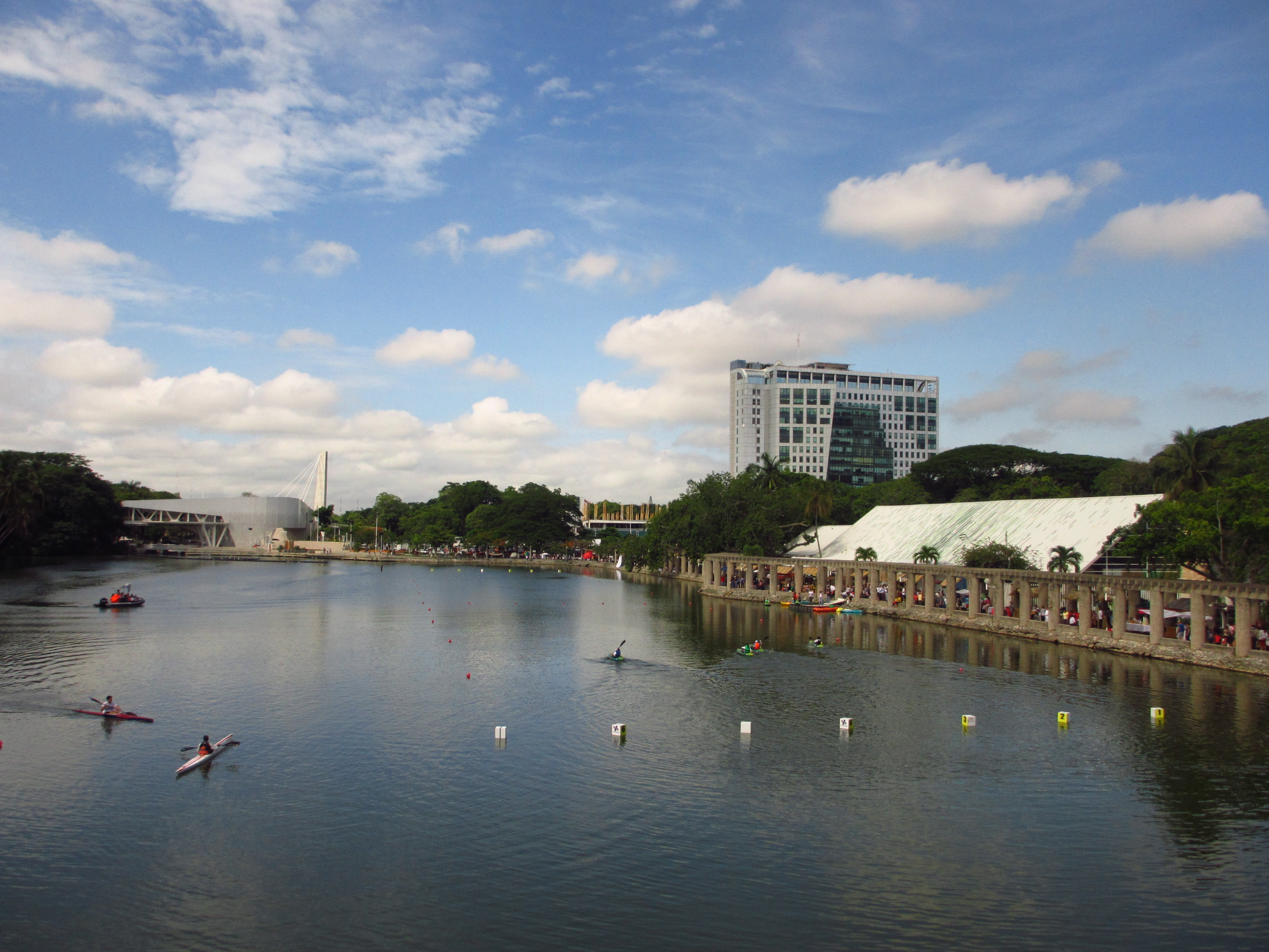 Actividades recreativas en la laguna de Las Ilusiones. Ciudad de Villahermosa, Tabasco, México.